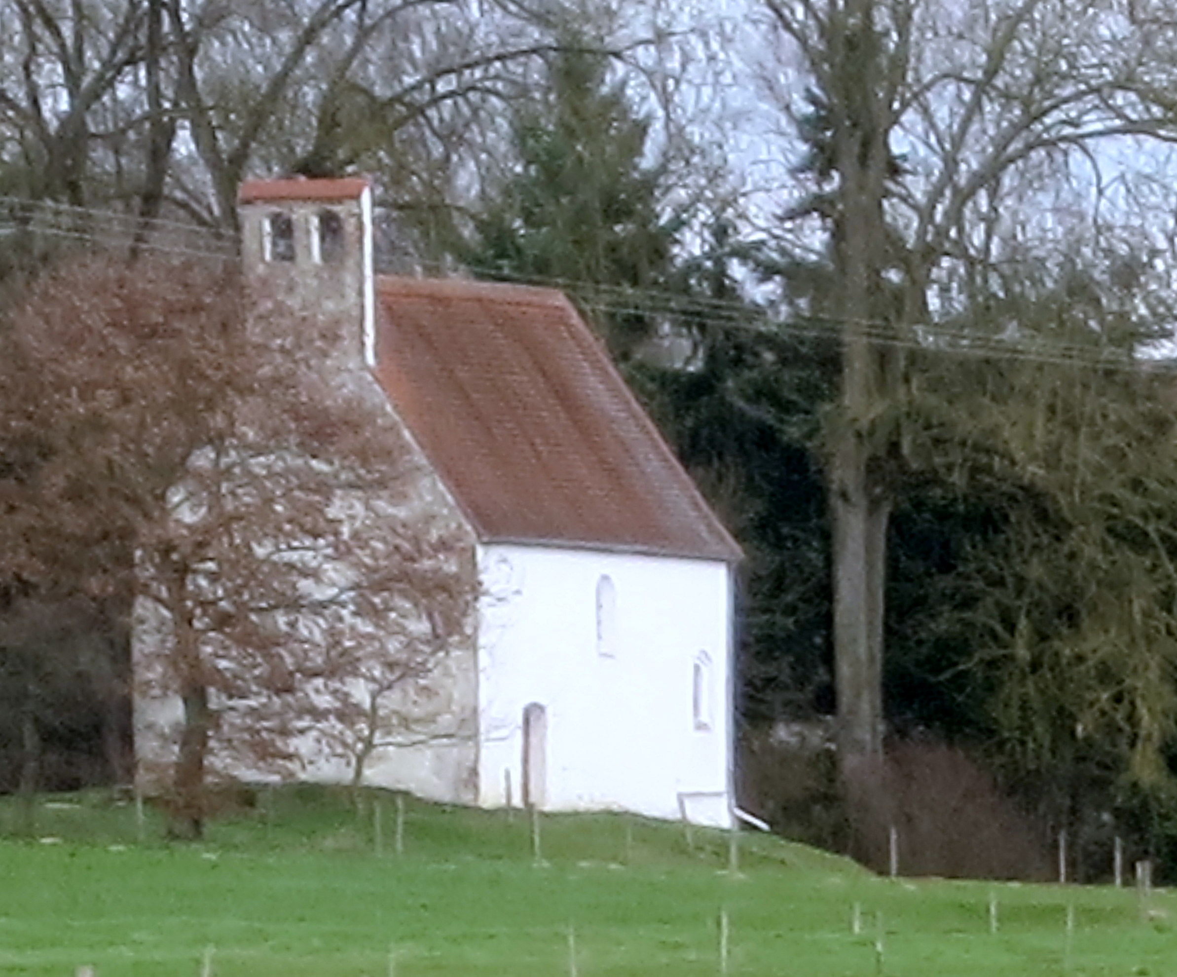 Eine spätmittelalterliche Kapelle, die auf Privatgelände des Bauernhofs steht